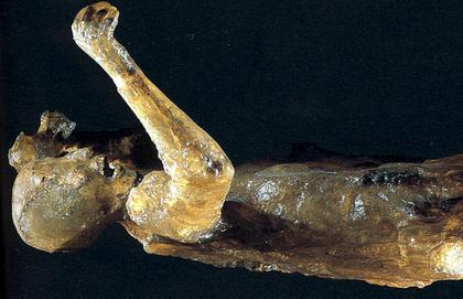 Dame d'Oplontis. Les corps pétrifiés de Pompéi sont mis en évidence par les moulages en plâtre qui ont été ici remplacés par de la résine époxy pour mieux voir les os internes.